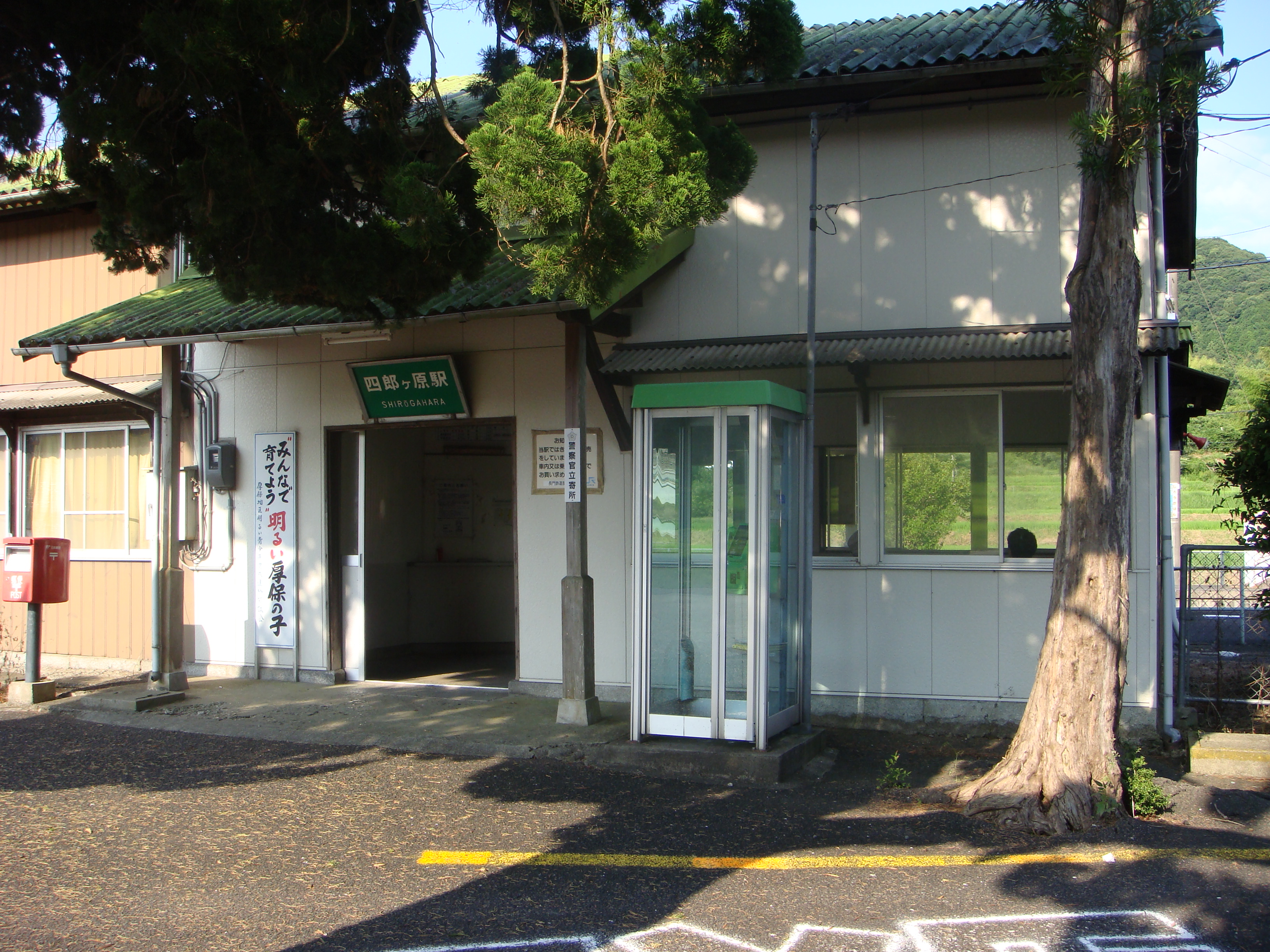 四郎ヶ原駅舎(2008.07.26に投稿者が撮影)